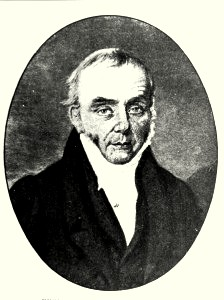 Porträt von William (Guillaume) Cockerill